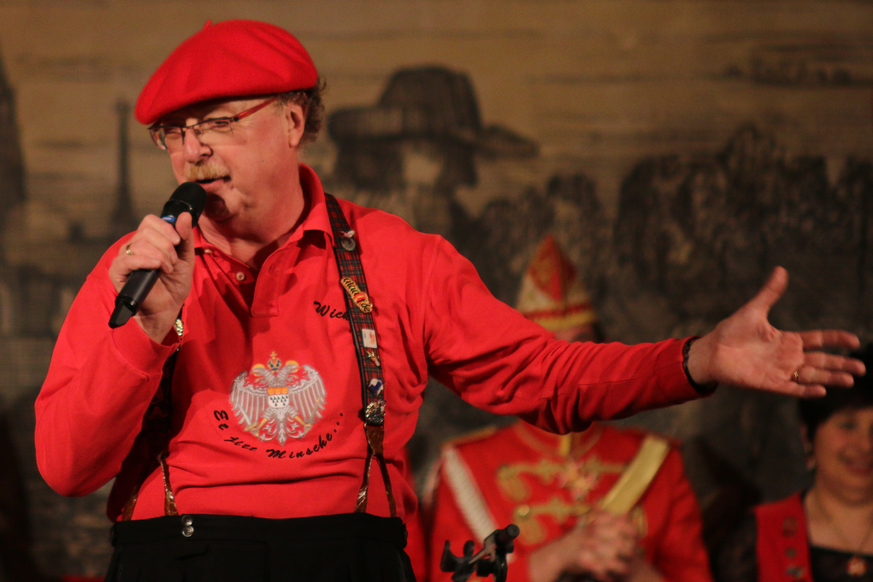 Kölner Husaren-Korps Prunksitzung 2014: Auftritt von Wicky Junggeburth